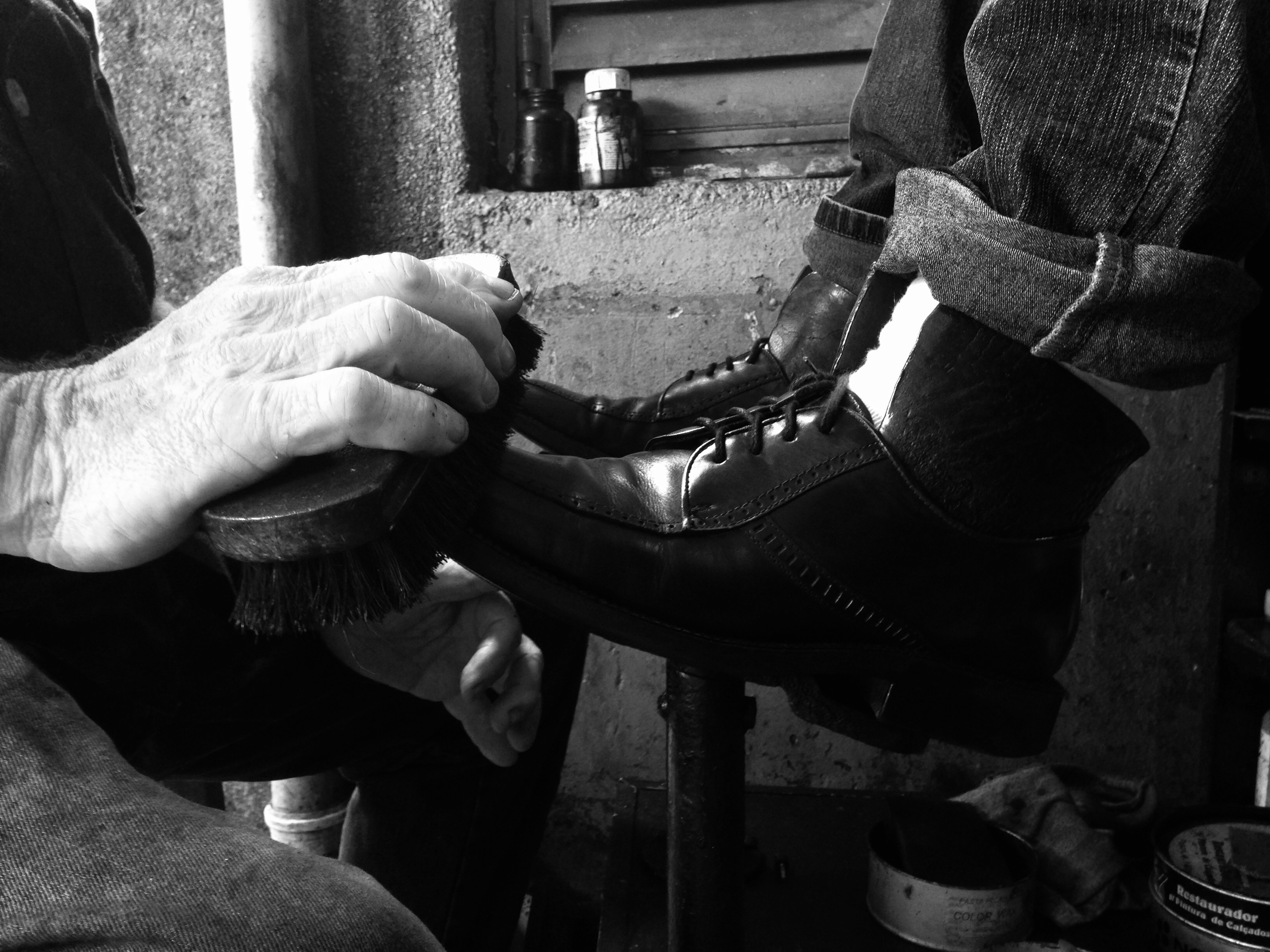 Engraxate trabalhando na Avenida Paulista - 21/03/16